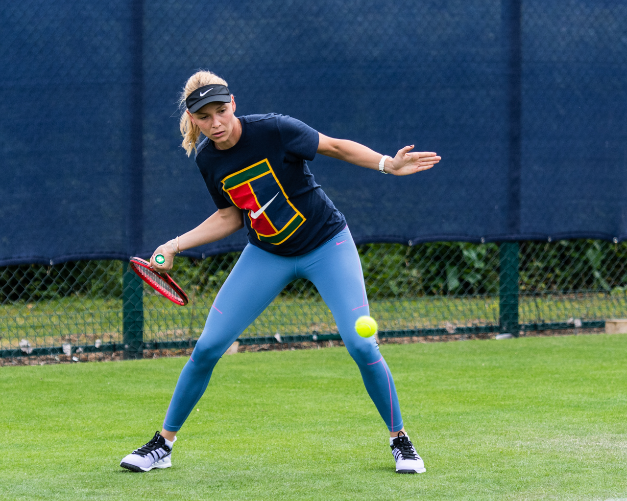 Donna Vekic